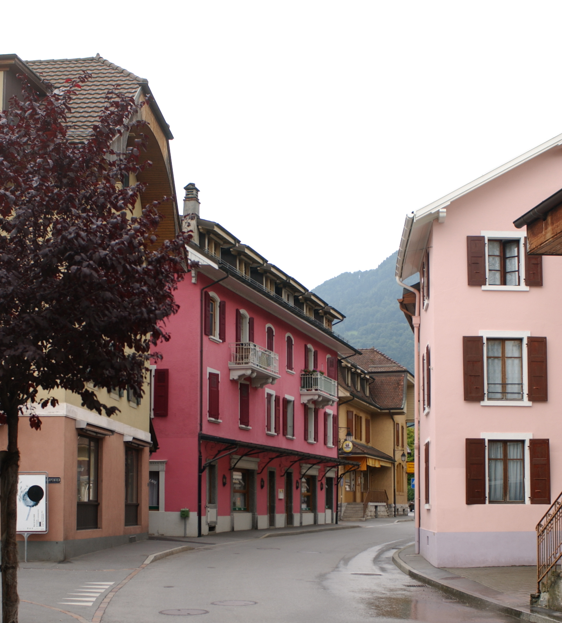 Bex (Vaud) : rue du Cropt